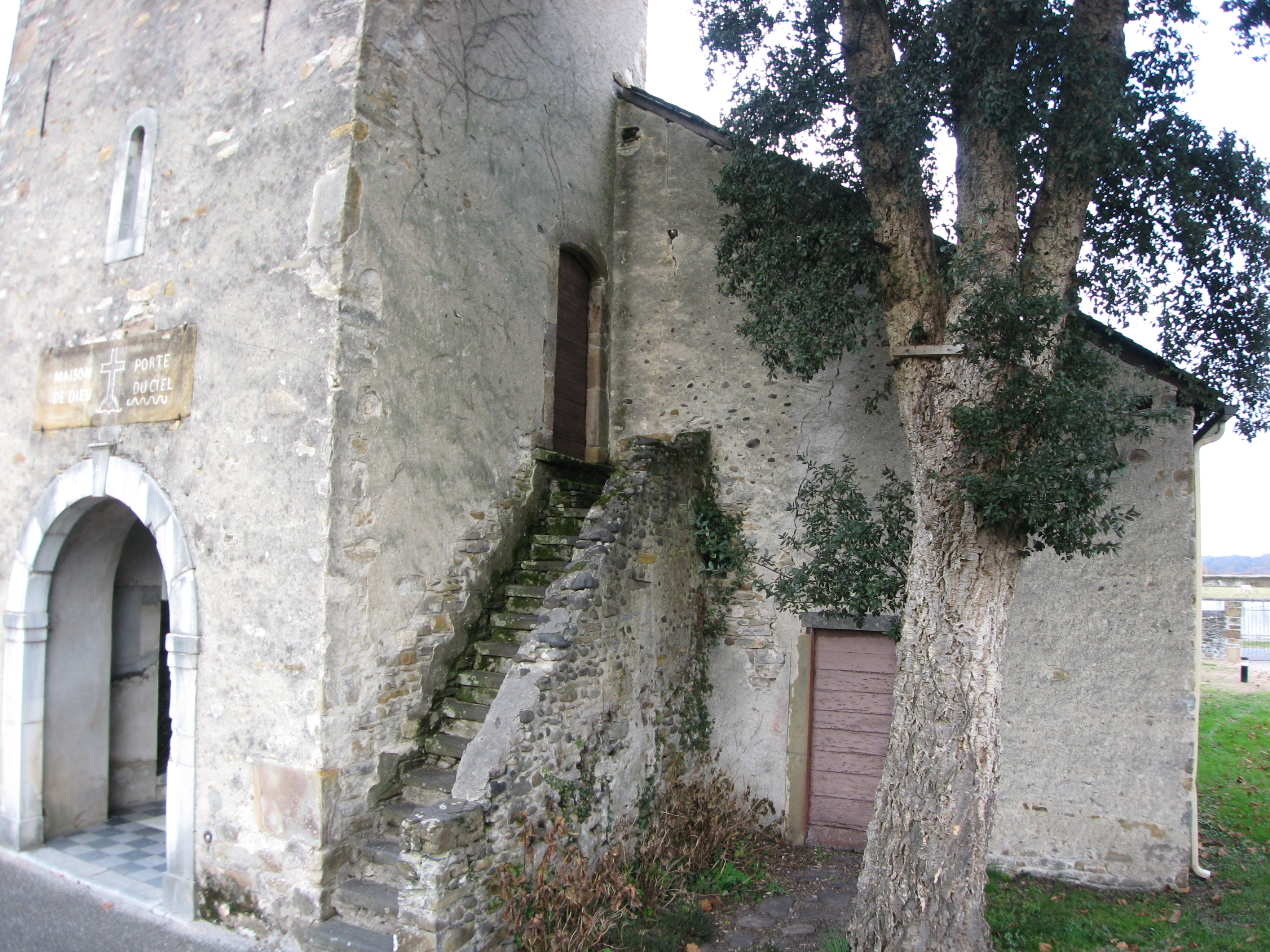 Escalier extérieur de l'église de Saint-Goin (Pyrénées-Atlantiques) (Pyrénées).